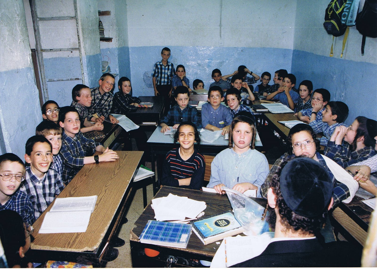 צילום לטובת התורמים בו רואים כיתה צפופה ביותר בבנין הישיבה הישן